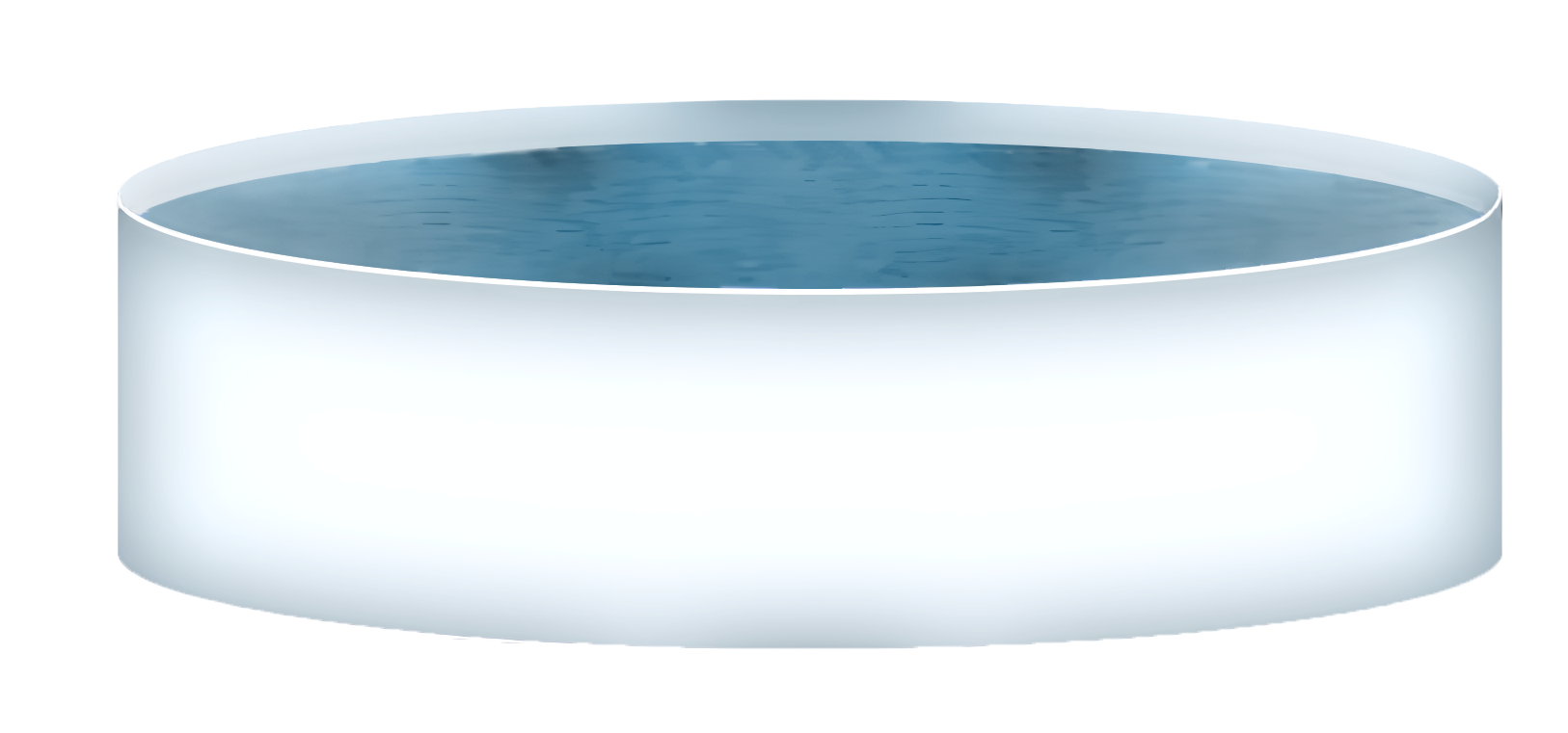 Ein einfacher Schwimmingpool.